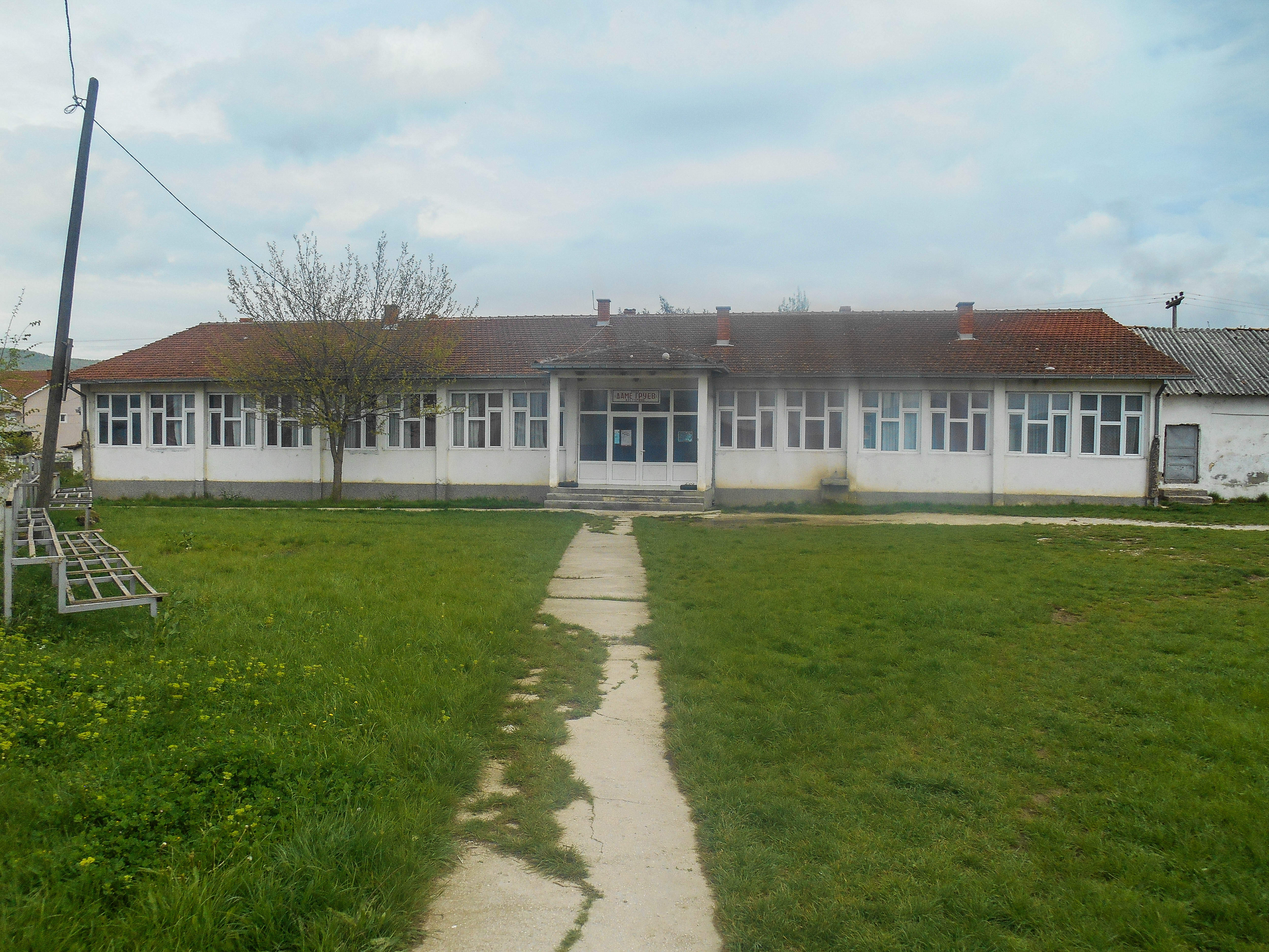 Училиште Даме Груев